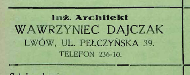 Реклама архітектора В. Дайчака у часописі Zycie techniczne, № 7-8, 1936.